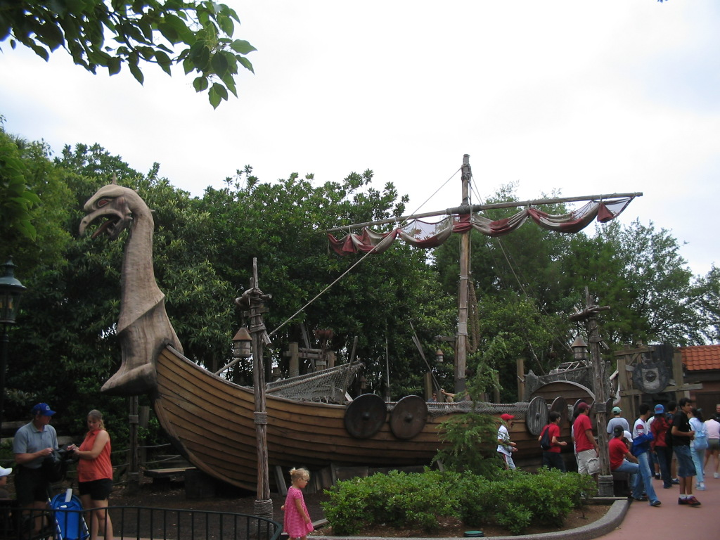 vikingship at Epcot, Orlando, May 2005